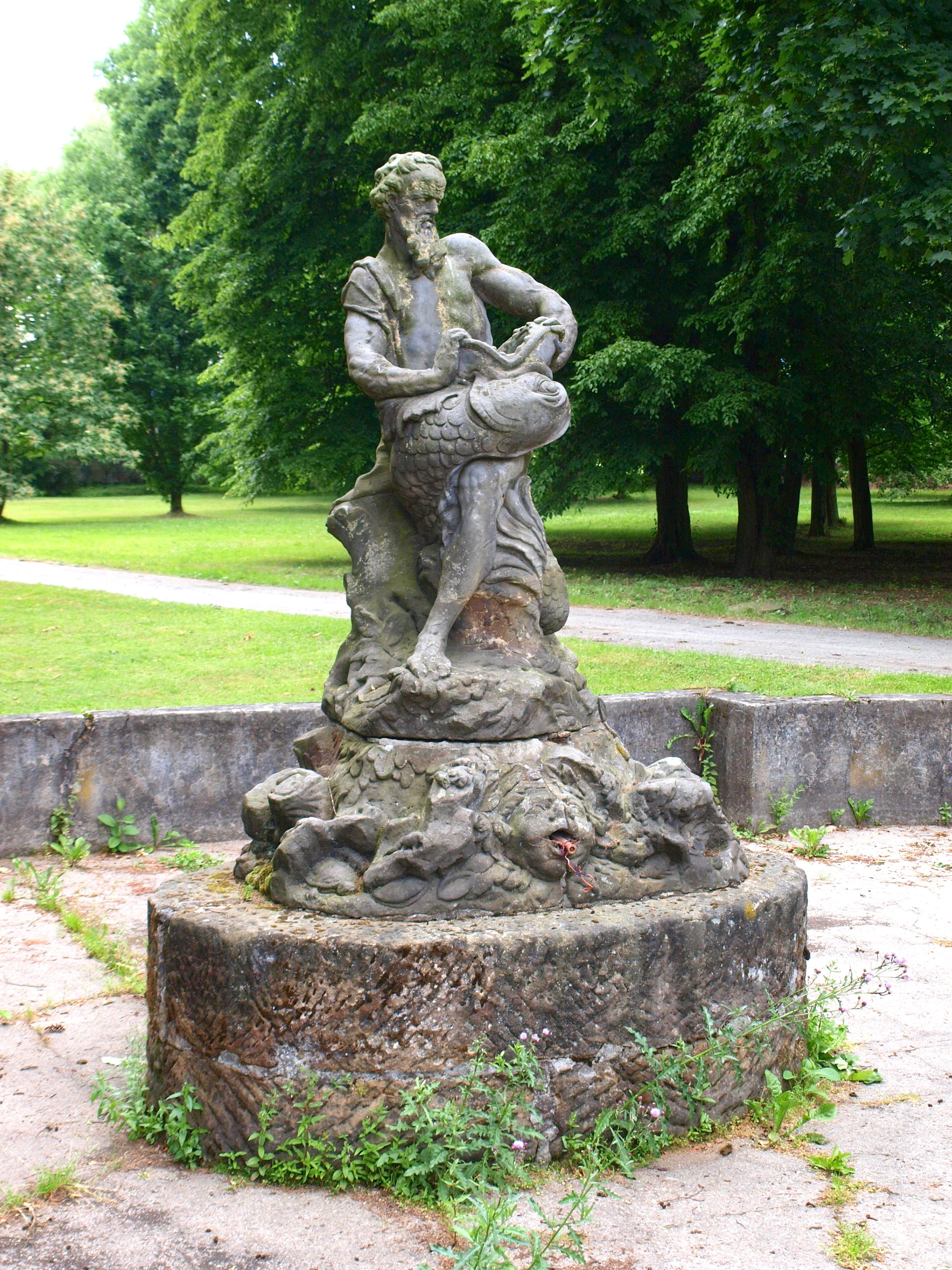 zámek ve Sloupu v Čechách